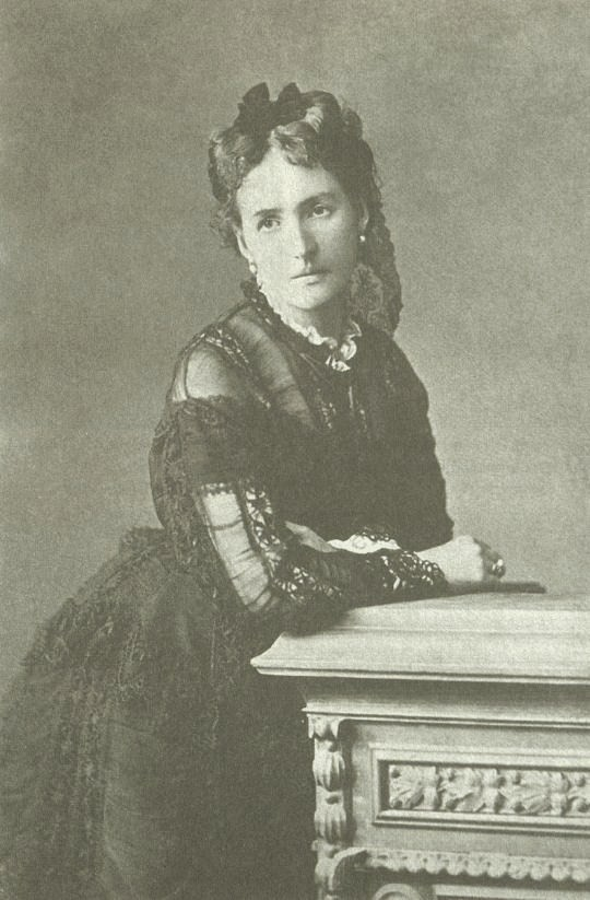 Екатерина Леонидовна Игнатьева, урож. княжна Голицына (1842—1917)